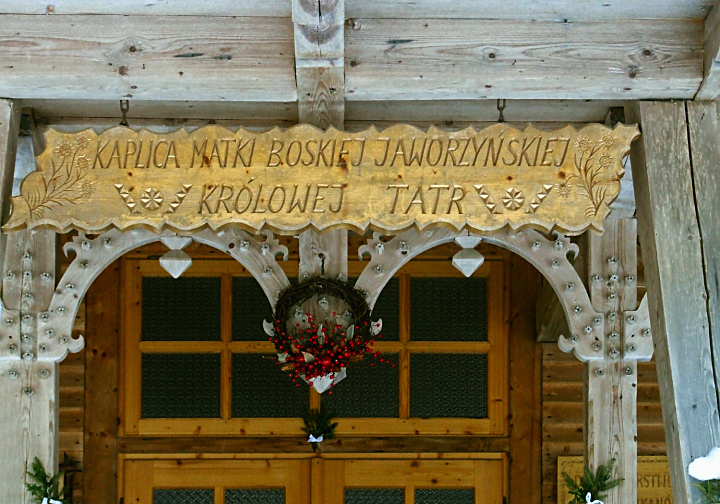 Sanktuarium_Maryjne_na_Wiktorówkach, wejście